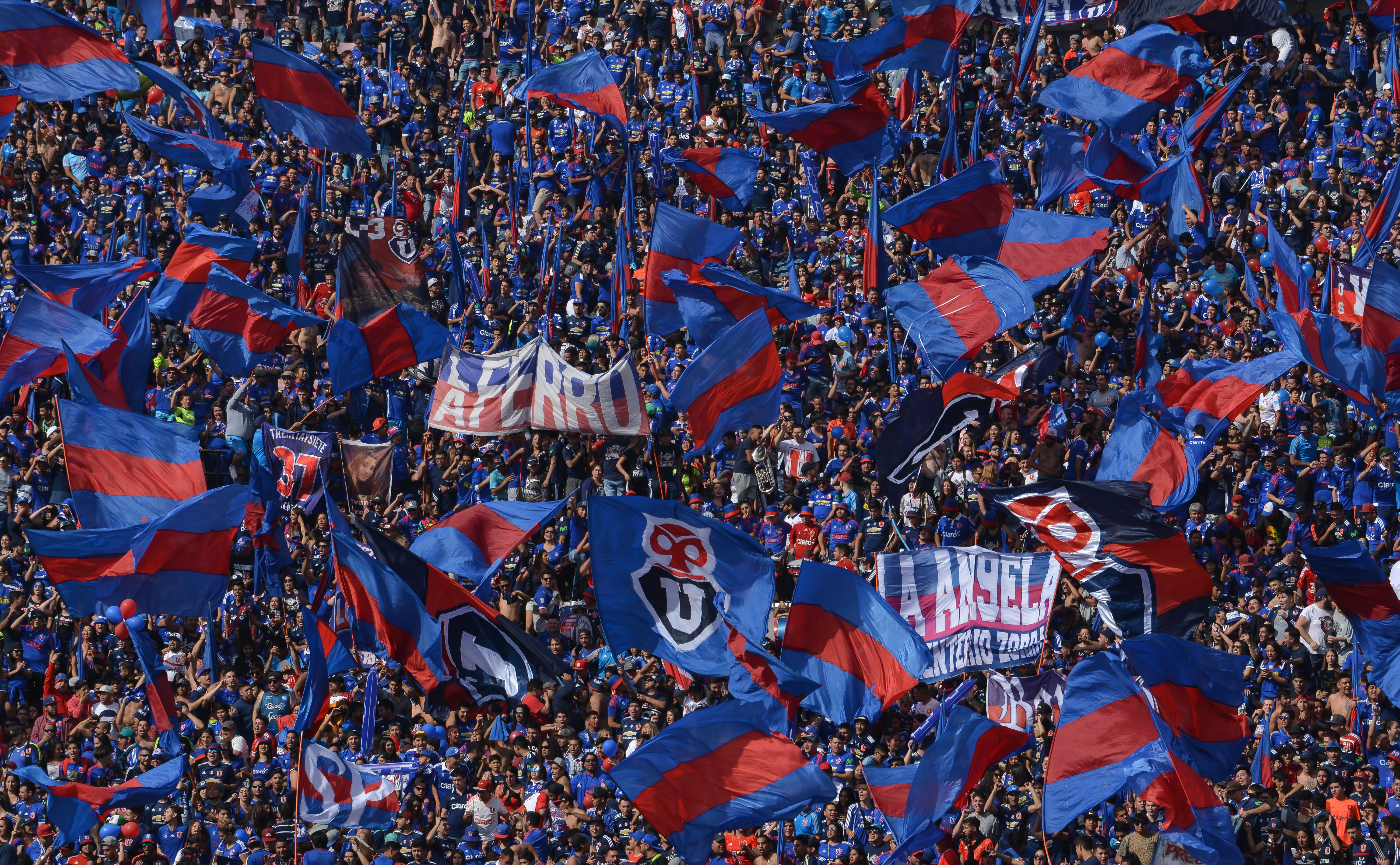 Universidad de Chile v Colo-Colo, Estadio Nacional, Santiago, Chile.